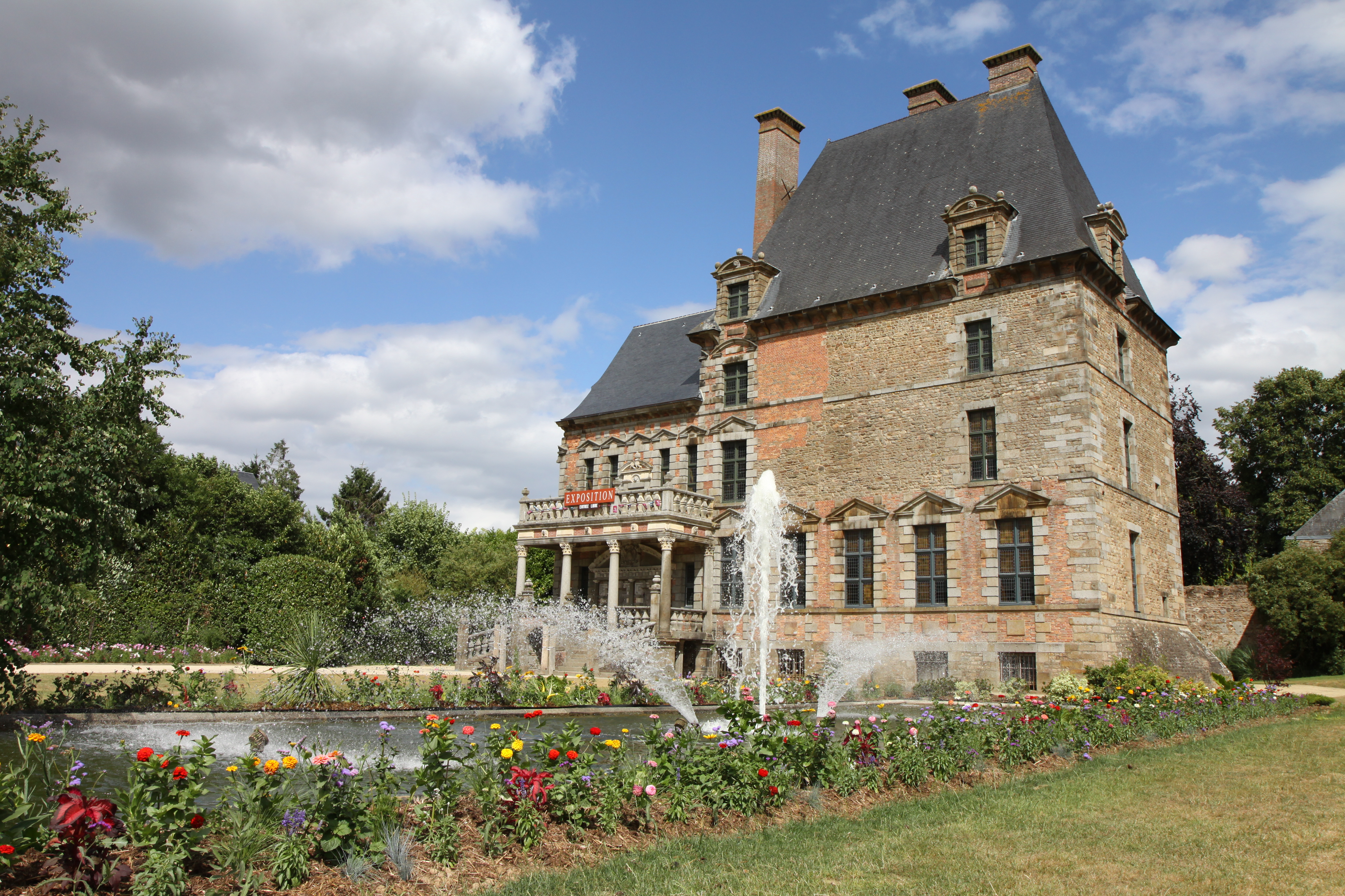 Le château de Ducey, classé Monument Historique, a été construit au début du XVIIème siècle par Gabriel II de Montgommery, fils de Gabriel Ier de Montgommery qui tua le roi Henri II lors d'une joute.